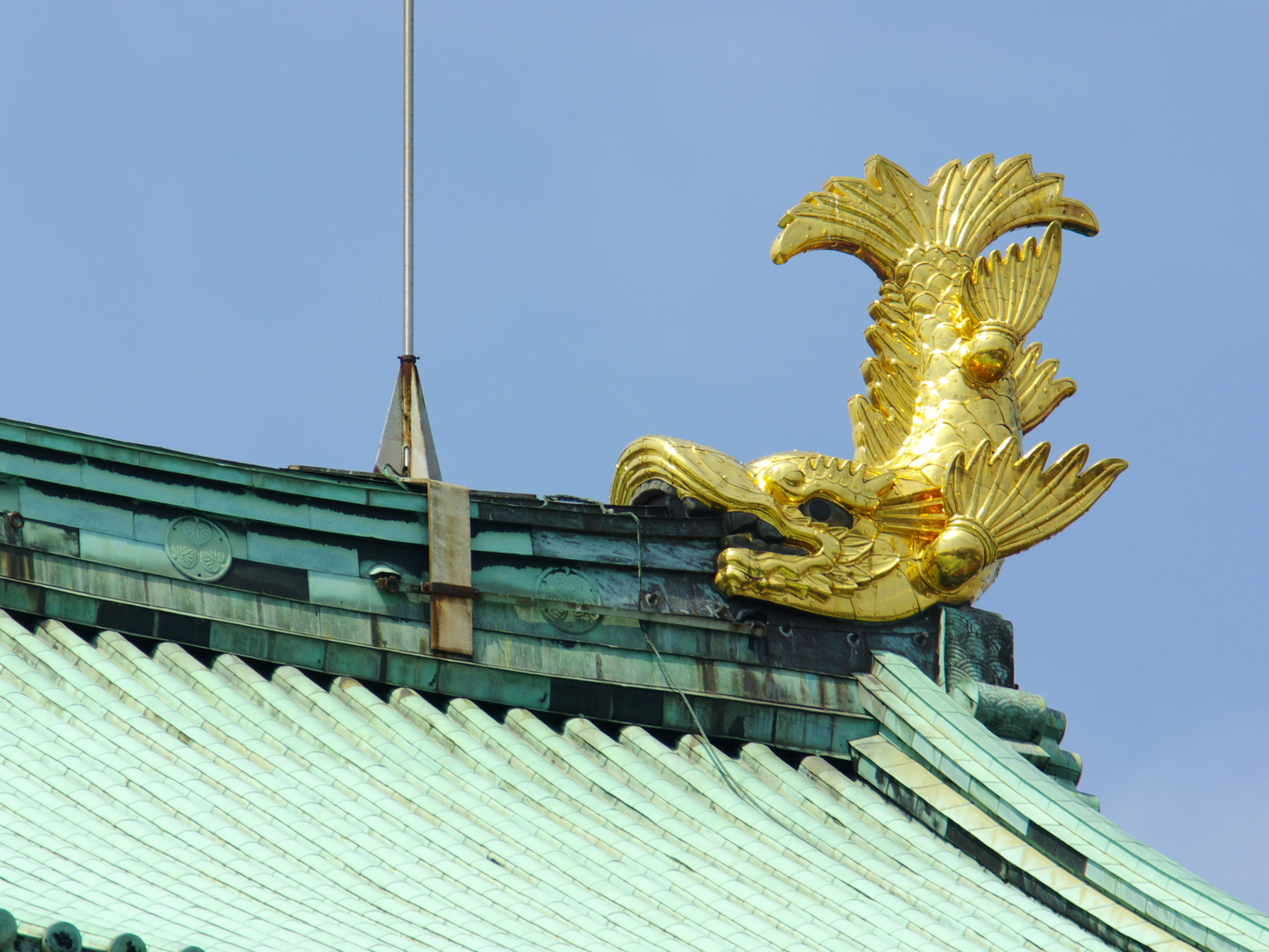 名古屋城復元天守屋根上の金鯱